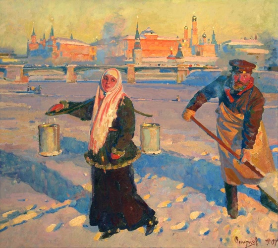 Kresthenskie morozy.